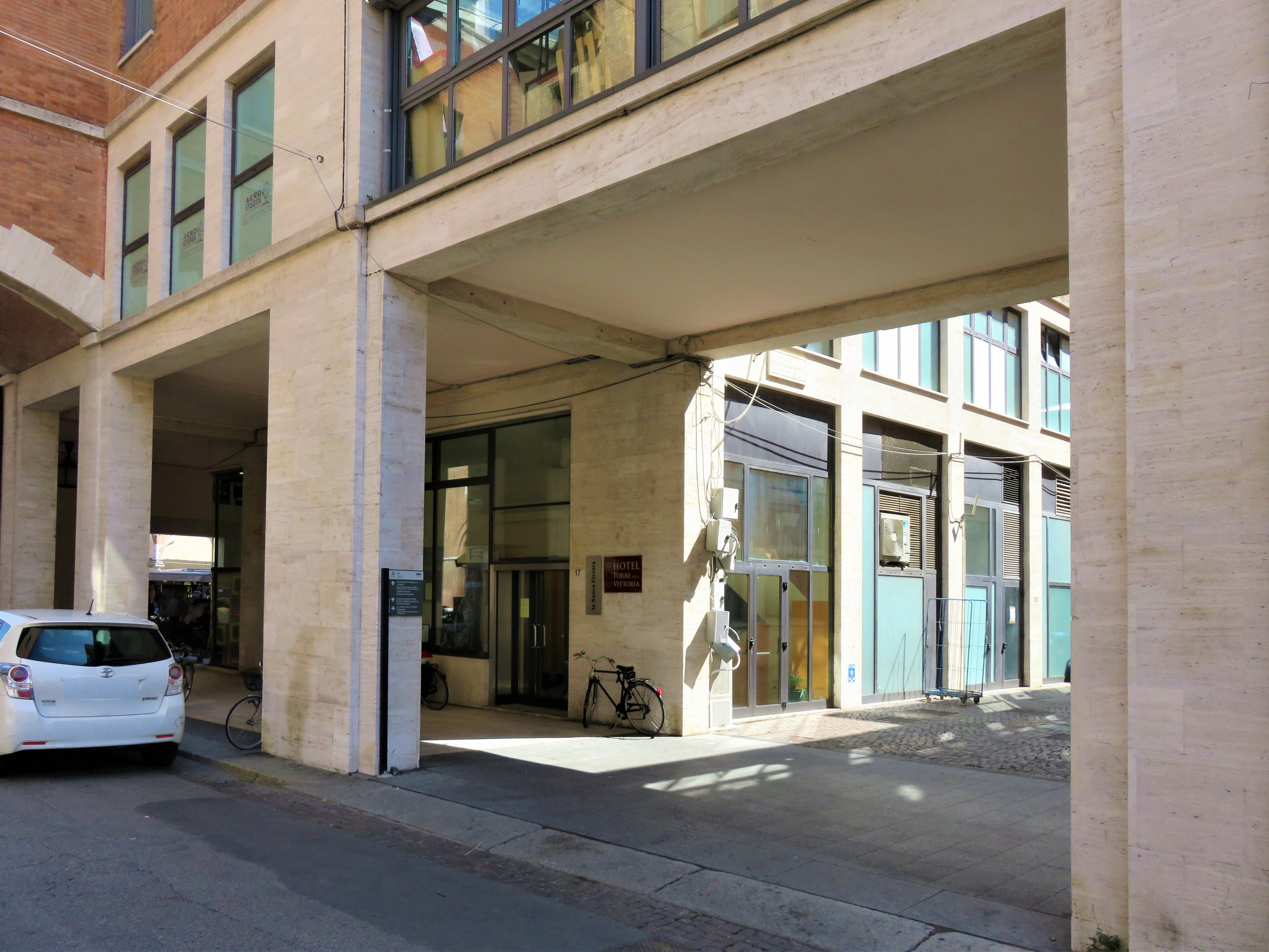 Corso Porta Reno. Verso piazza Trento e Trieste. Sede di la Nuova Ferrara